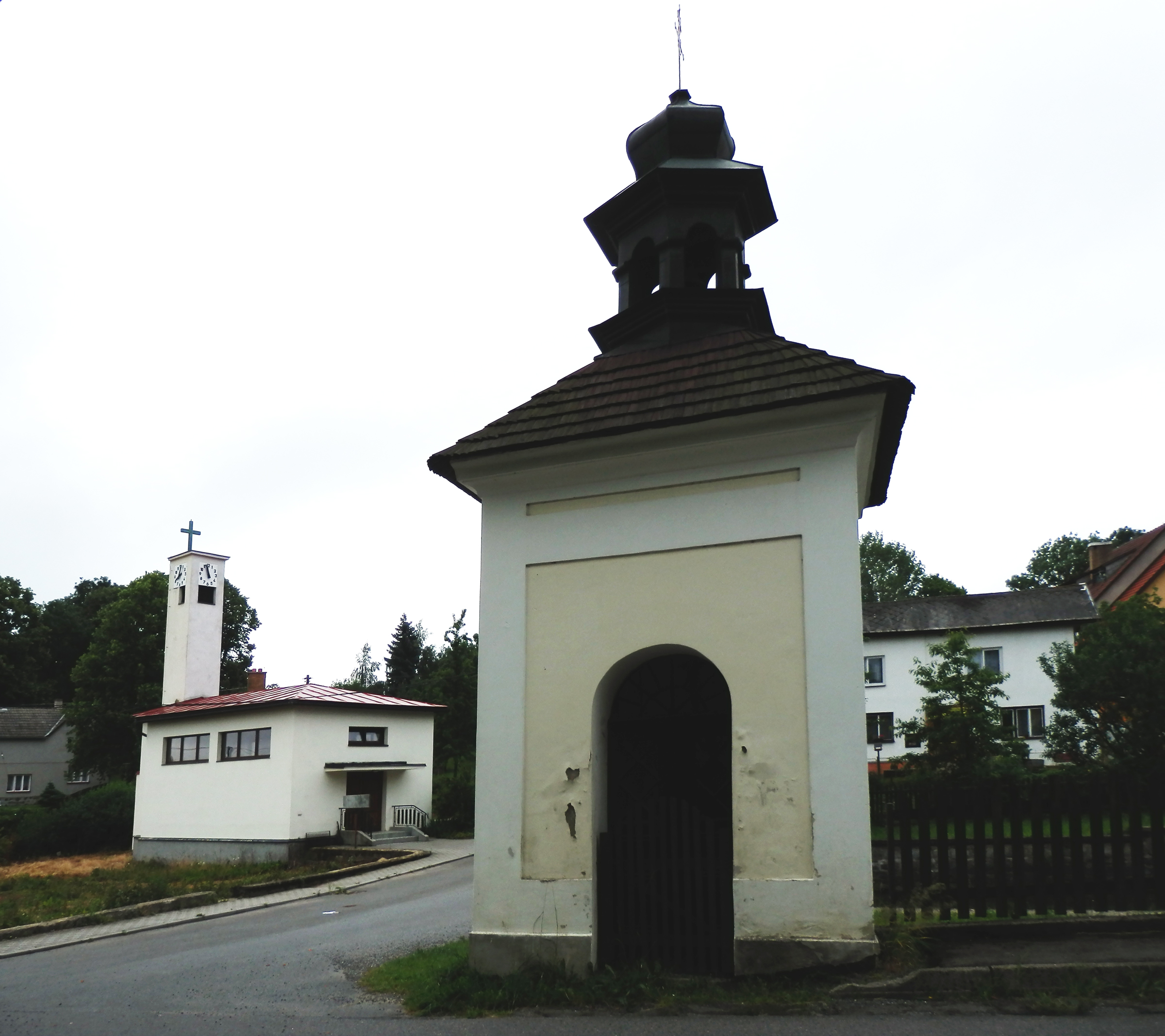 Kaplička sv. Jana Nepomuckého (Nyklovice), na návsi, Nyklovice